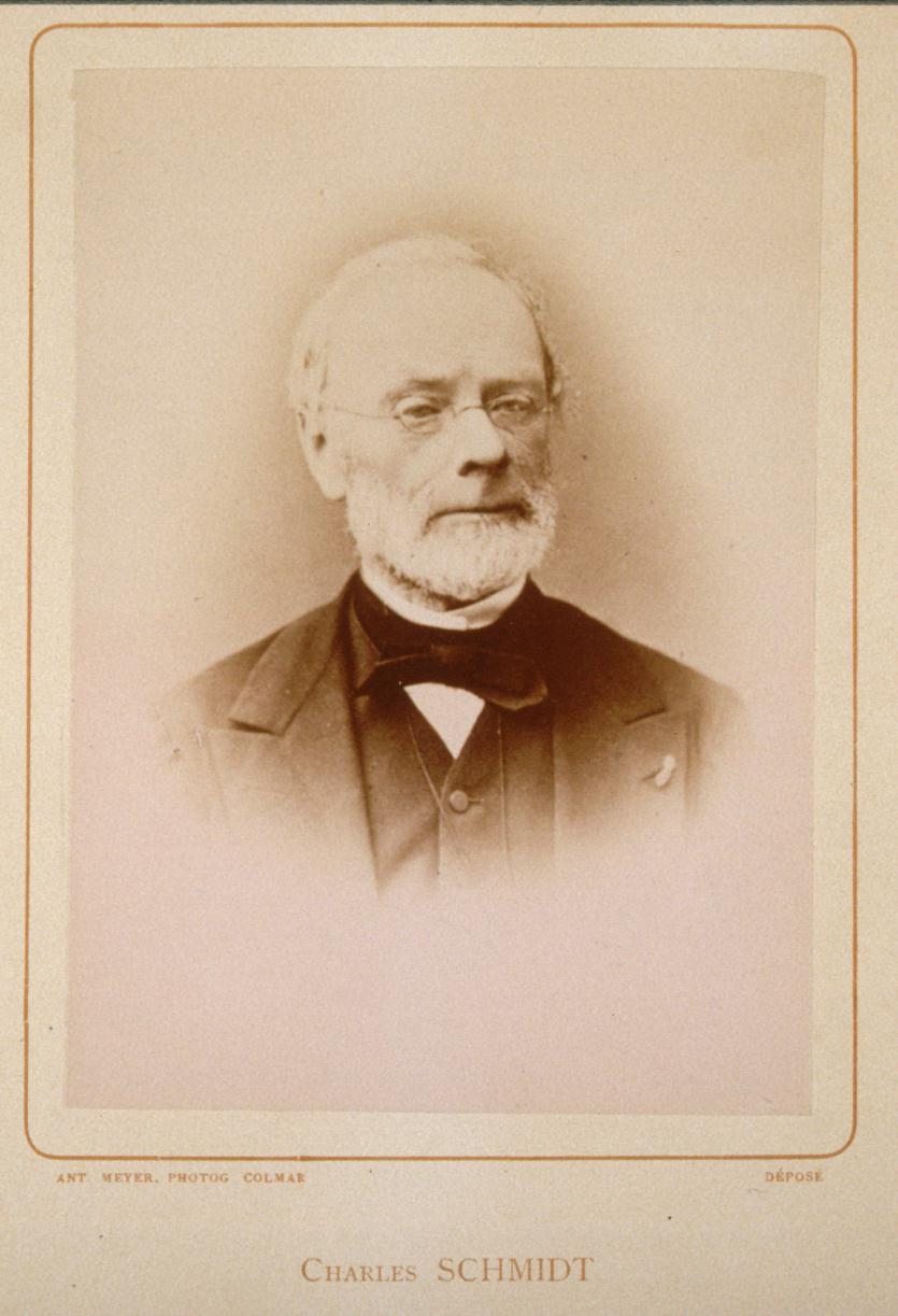 Portrait de l'historien et théologien strasbourgeois Charles Schmidt. Coll. BNUS